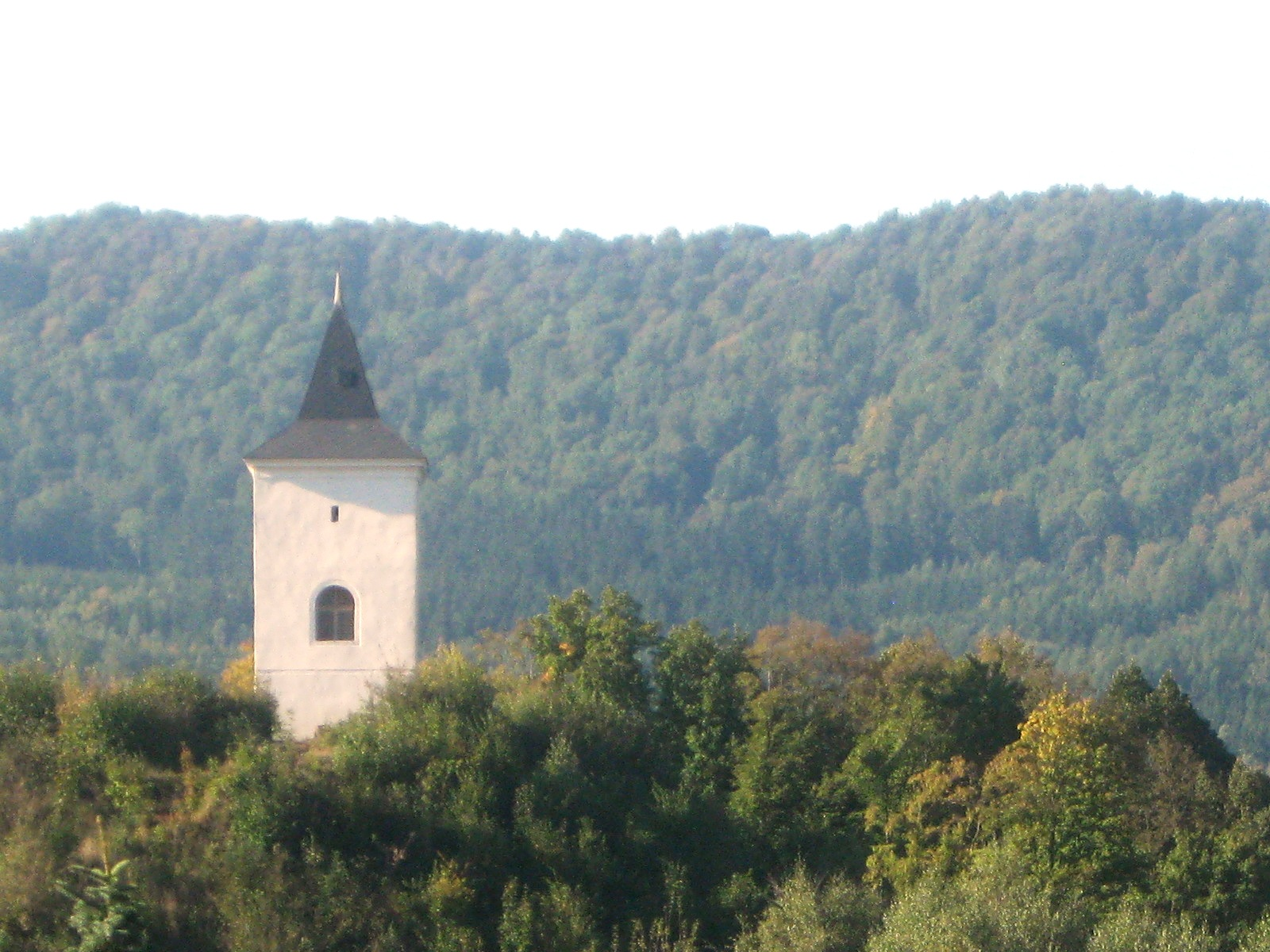 Původní levínský hrad byl postaven na skále nad strategicky důležitou cestou ve 13tém století a zničen pravděpodobně během husitských válek. Nyní jsou zřejmé jenom nepatrné zbytky opevnění. Na místě hradu byla v roce 1699 postavena zvonice. Nynější vyhlídková věž (460m n.m.) byla opravena v roce 2004. V pozadí hora Sedlo, majestát východní části Českého Středohoří.